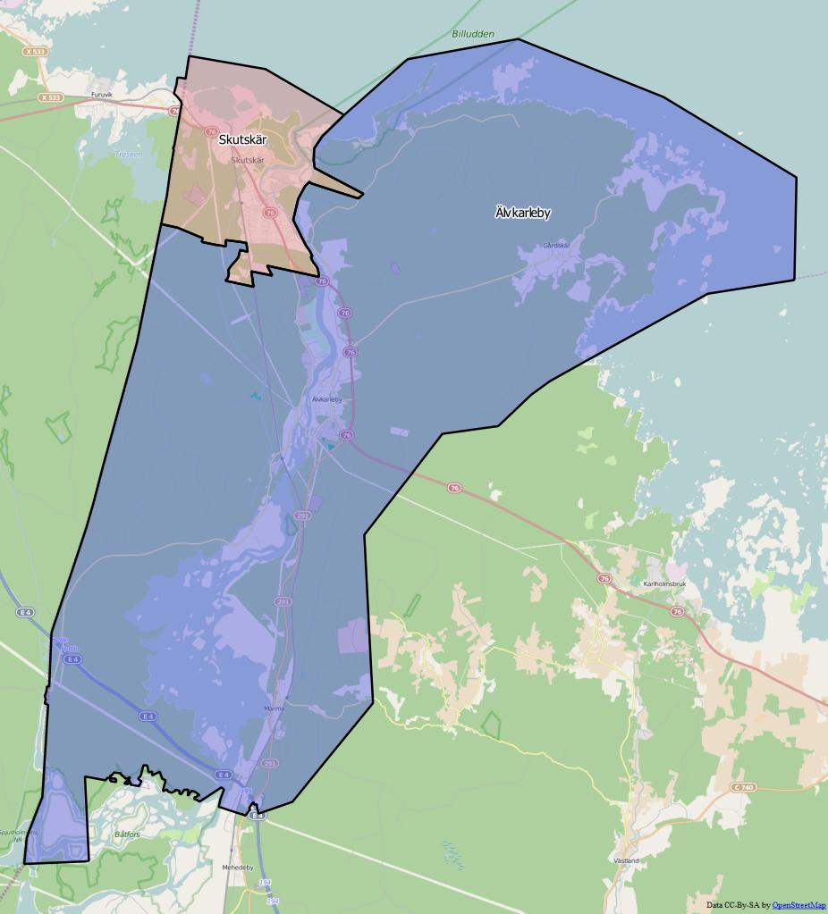 Distriktsindelningen i Älvkarleby kommun World file 54.14979758010931477 0 0 -54.14979758010931477 1923035.71613084245473146 8552224.70378252677619457